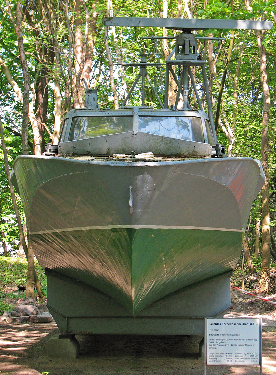 Dieses Bild zeigt ein Leichtes Torpedoschnellboot (LTS) der Volksmarine im Marinemuseum Dänholm. Typ: Schnellboot Projekt 63 / 63.300 Iltis Typ LTS Bauwerft: Peenewerft Wolgast Stückzahl: 36 Länge ü.A.: 14,9 m Breite ü. A.: 3,4 m Tiefgang: 0,60 m Antrieb: Zwei Dieselmotoren M 50 F 4 mit 1765 kW auf 2 Schrauben Geschwindigkeit: 52 kn Bewaffnung: zwei Torpedorohre (Ø 533 mm) Besatzung: 3 Mann Im Einsatz bei der Volksmarine der DDR bis 1977. Other Versions